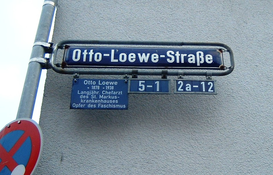 Schild der Otto-Loewe-Straße in Frankfurt-Bockenheim. Stolpersteinlage Arndtstraße 29, vor dem Wohnhaus des Dr. Otto Loewe, geboren 31.10.1878, von der Gestapo ermordet am 11.11.1938. Er war Facharzt für Chirurgie und Röntgenologe und hatte sich um den Aufbau des Krankenhauses des Diakonissenheims in der Falkstraße 35 des Bockenheimer Diakonissenvereins, Vorläufer des evangelischen St. Markuskrankenhauses, verdient gemacht.